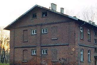 Koszary wojskowe przy ul. Chrobrego w Radomiu